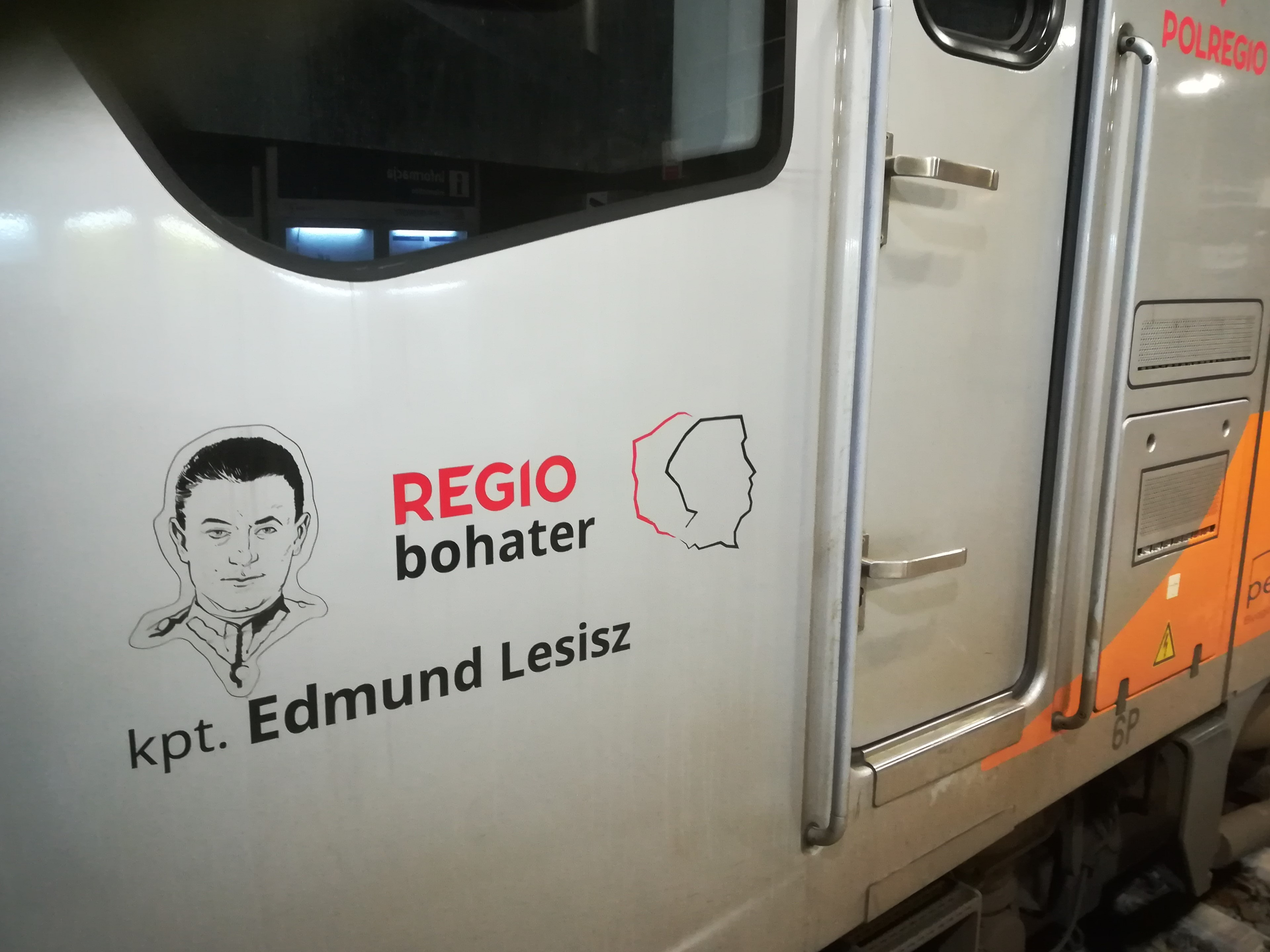 Gorzów Wielkopolski Wschodni.